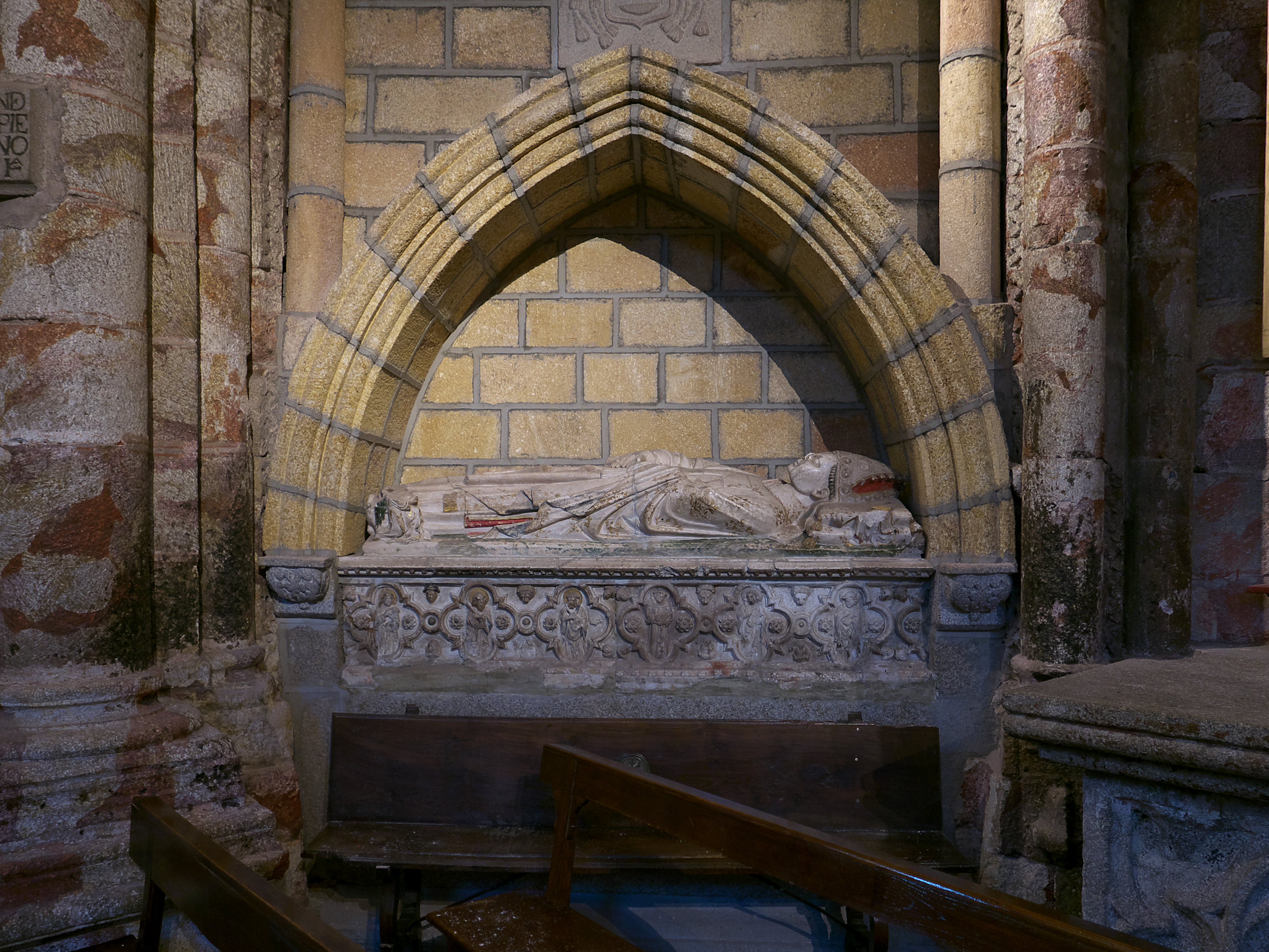 Capilla de Nuestra Señora de la Claustra. Sepulcro del obispo de Ávila (1378-1394) Diego de las Roelas (†h. 1394-1396). Sepulcro atribuido al taller toledano de Ferrand González.